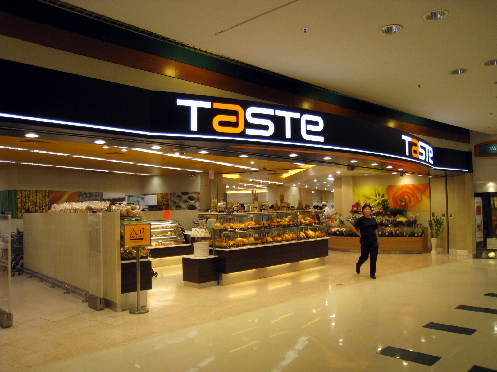 Taste Supermarket in Maritime Square